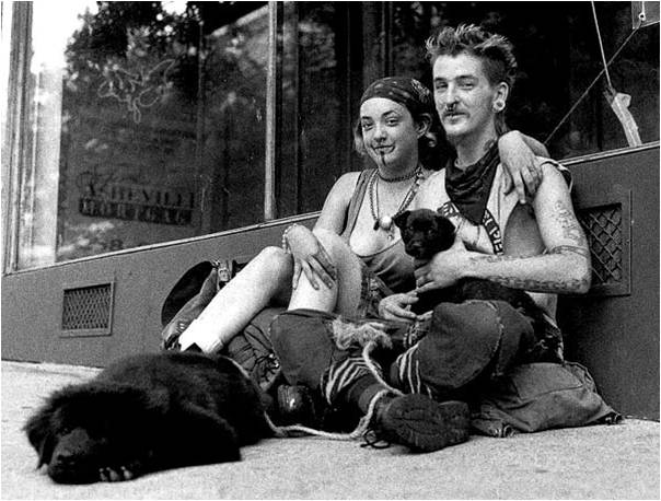 Familia hippie, pansexualista y psicodélica